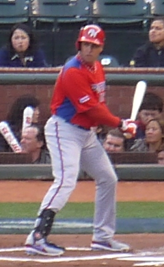 Carlos Beltrán